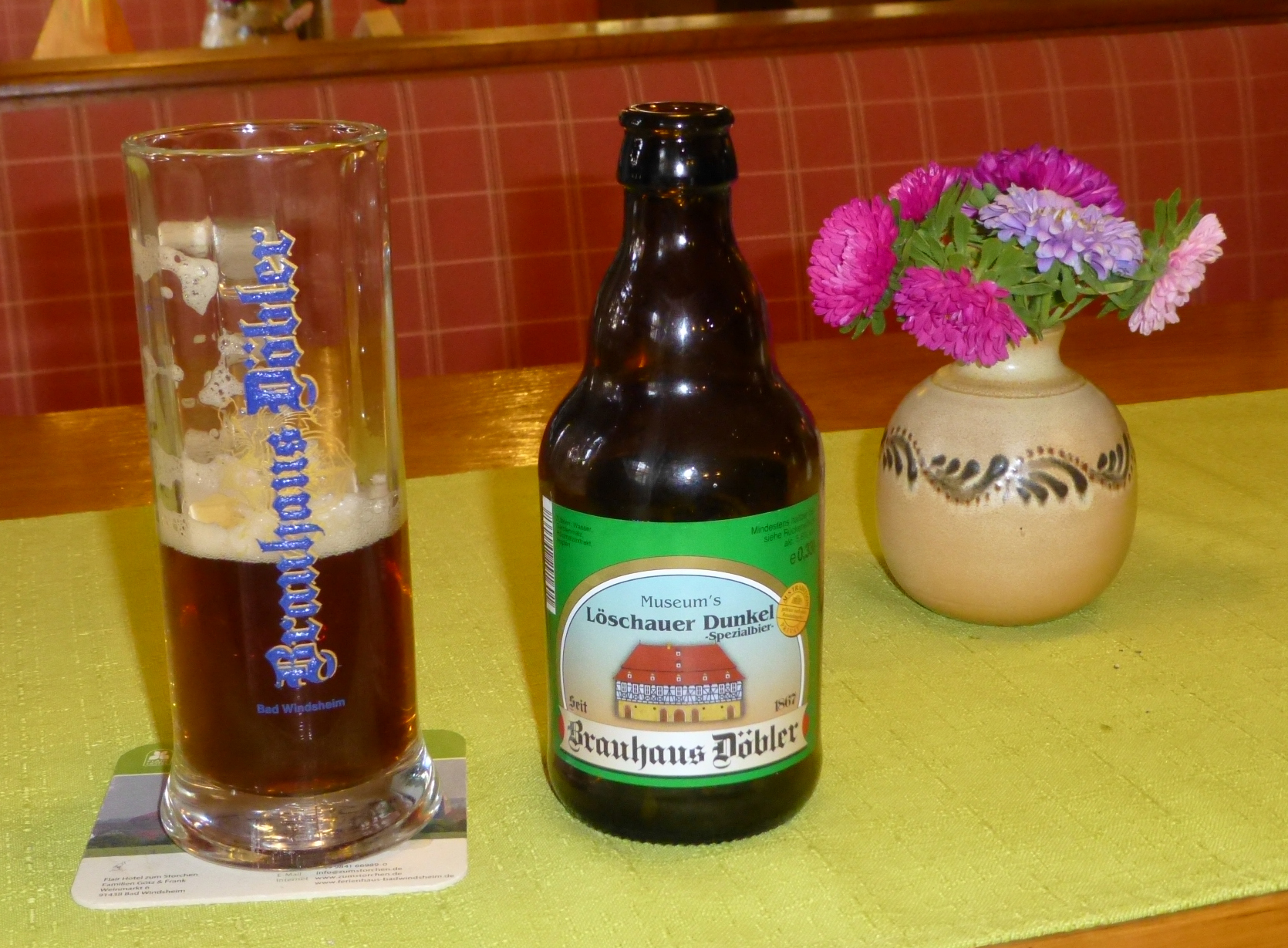 Bière brune de la Brasserie Brauhaus Döbler à Bad Windsheim, Franconie, Bavière.